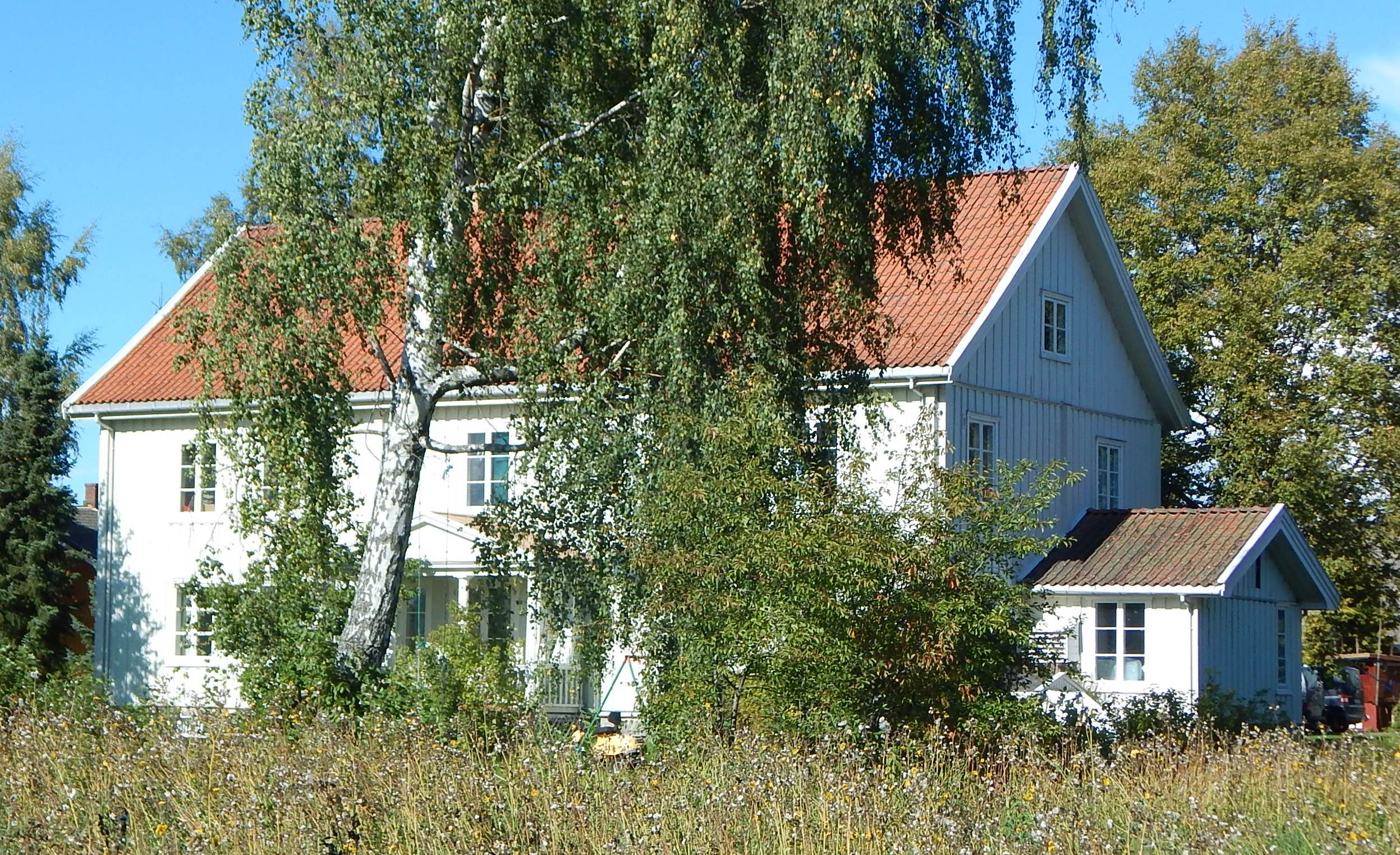 Hovedbygningen ved Hof prestegård